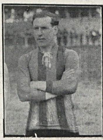 José Brachi (1994-?), futeboloista uruguaio